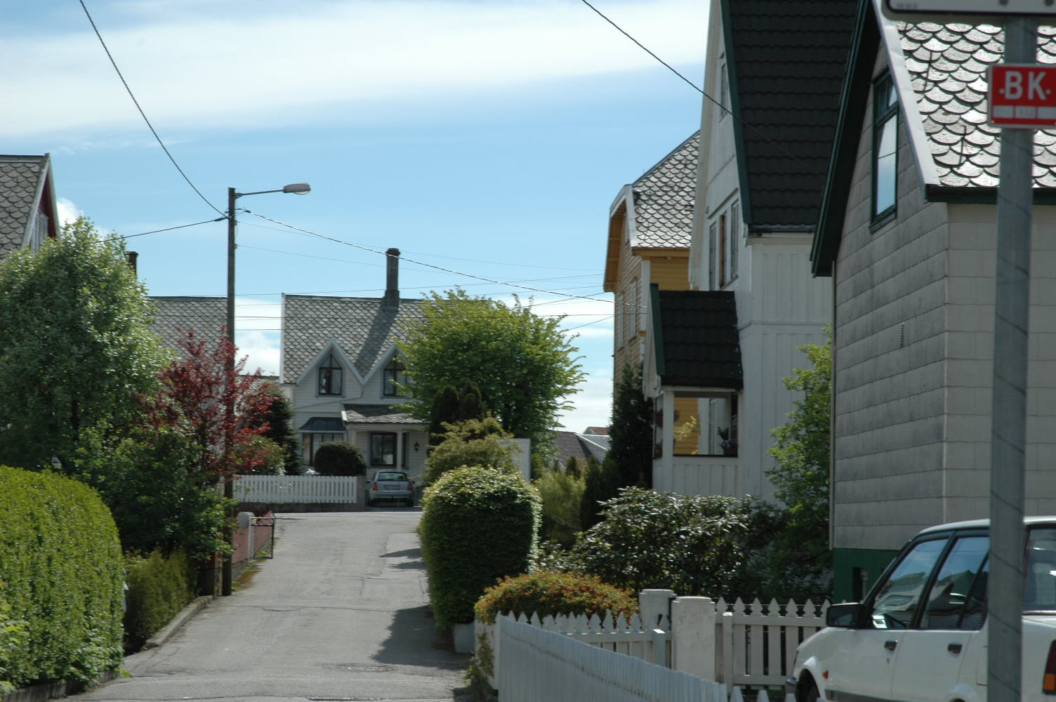 Gate i Haugesund